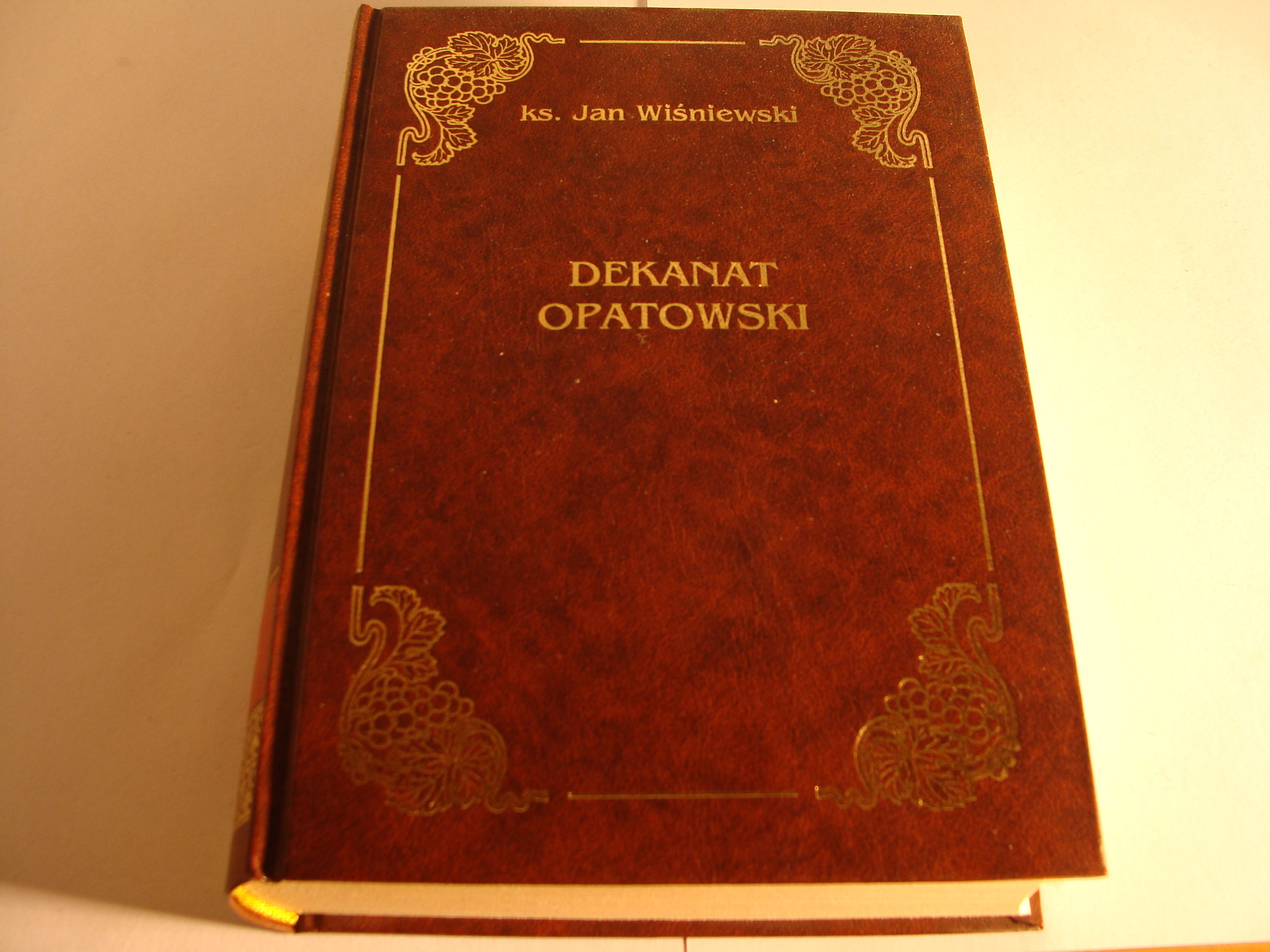 Jan Wiśniewski Dekanat opatowski